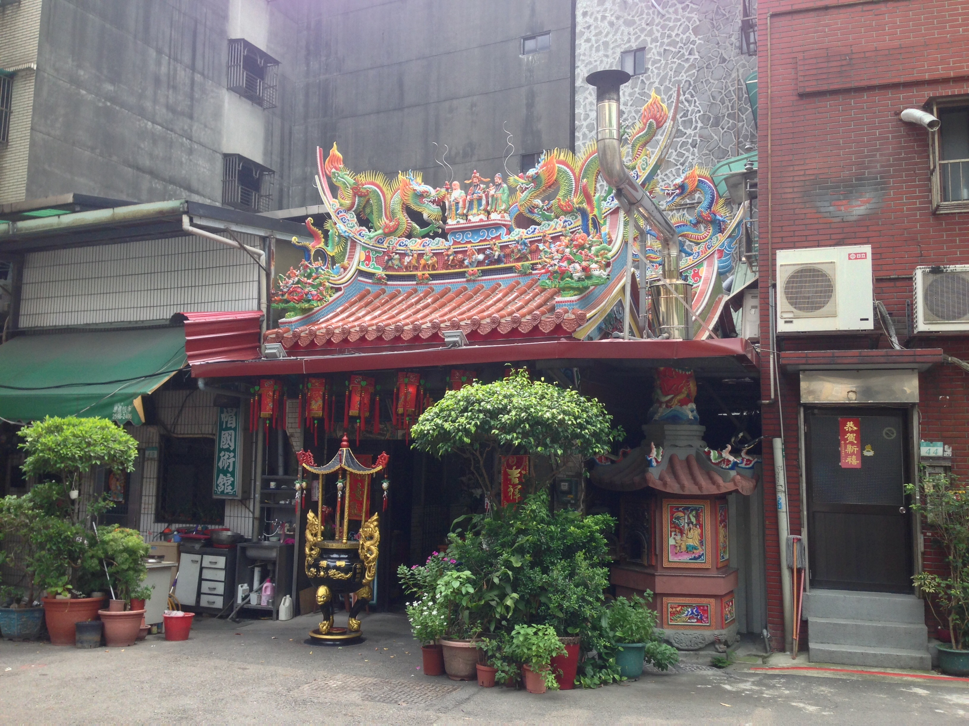 中文（台灣）: 台北市大同區甘谷街四二號的和德祠。